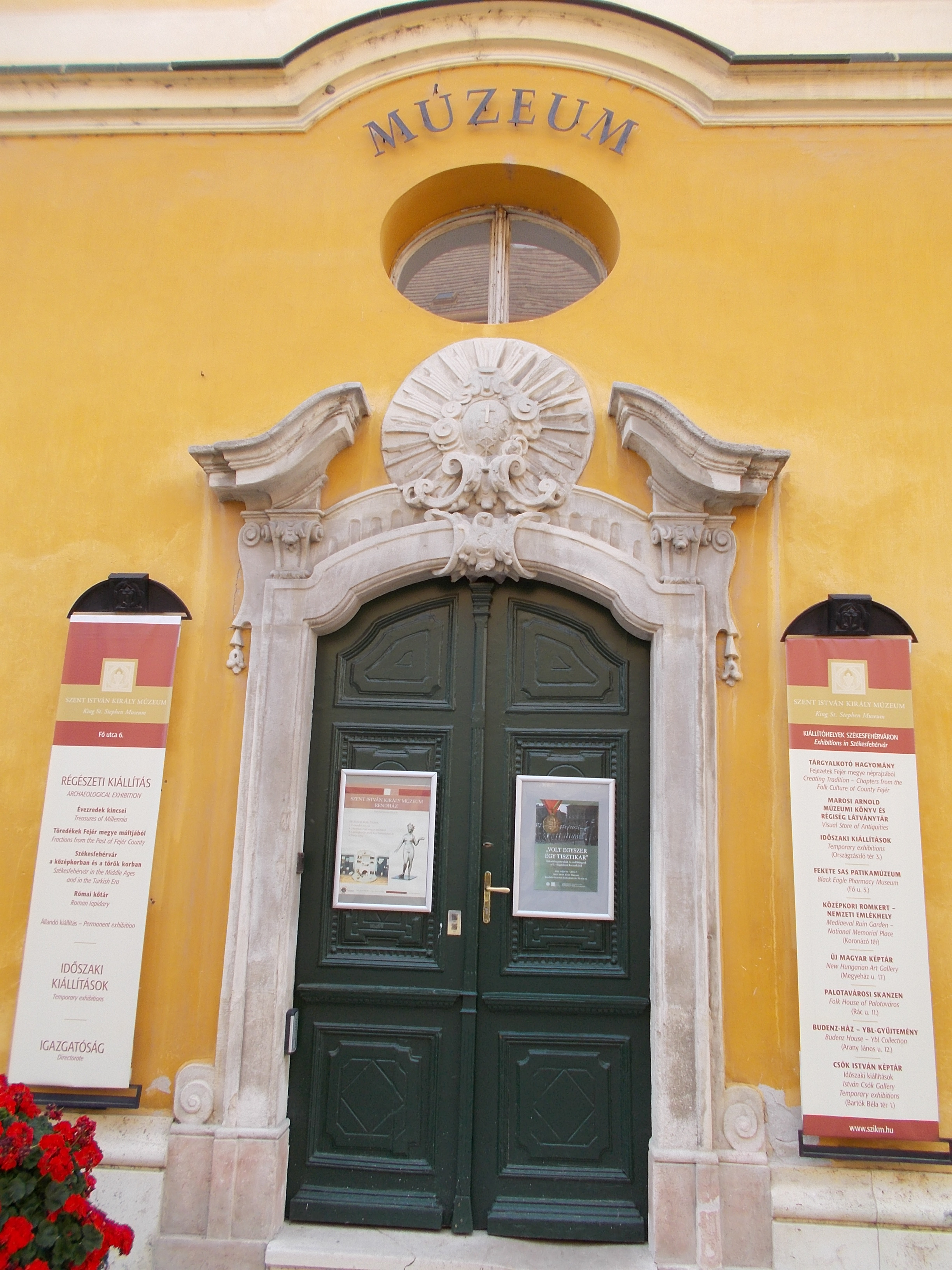 A Szent István Király Múzeum bejárata. Műemlék ID 3828. Régészeti kiállítás, a Szent János-templom déli szárnyában. Jezsuita-, pálos-, majd cisztercita rendház. - Magyarország, Fejér megye, Székesfehérvár, Belváros, Fő utca 6. This is a photo of a monument in Hungary. Identifier: 3828